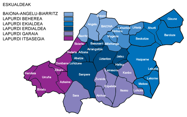 Mapa de la provincia histórica de Labort (Labourd en francés, Lapurdi en euskera) con sus municipios (nombres en euskera según Euskaltzaindia).